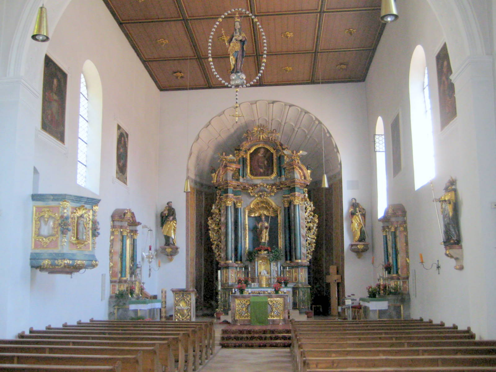 Münchsmünster ist eine Gemeinde des LKr. Pfaffenhofen a.d. Ilm.